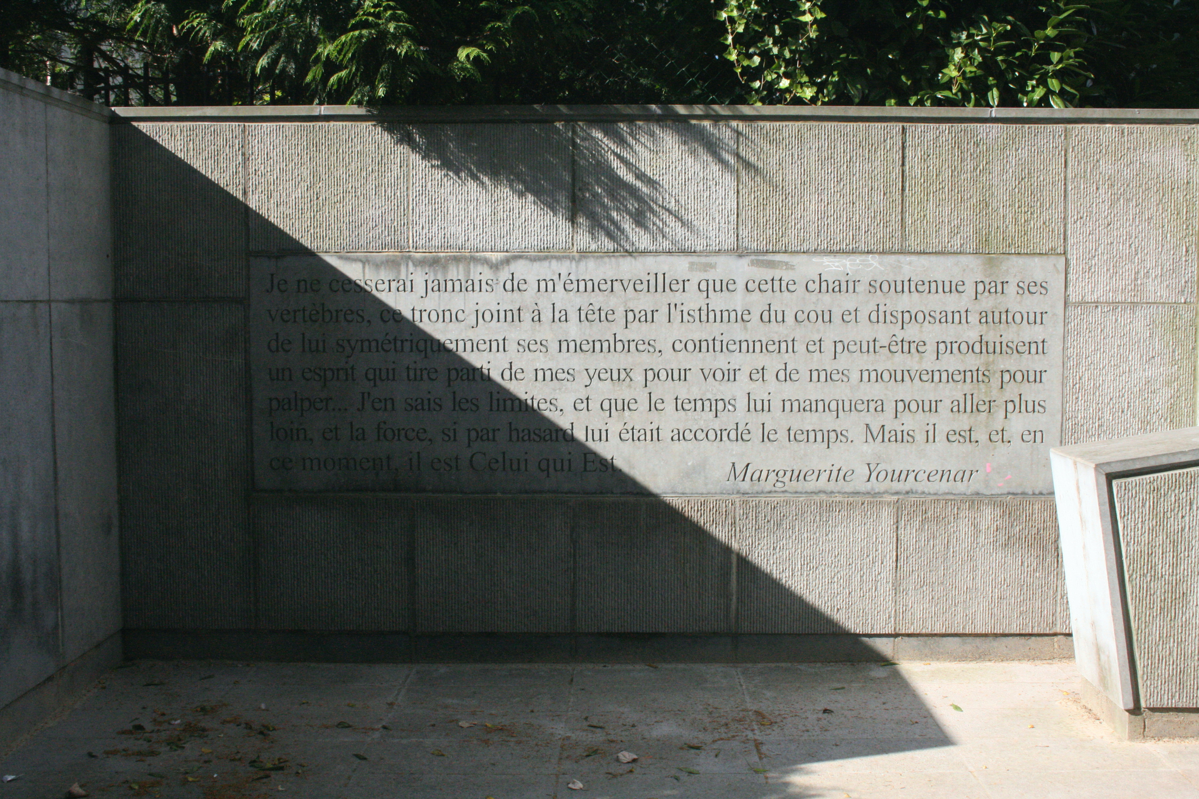 Parc d'Egmont, Bruxelles (Belgique). Passage Marguerite Yourcenar donnant accès à la rue aux Laines. Une des 14 citations de "L'oeuvre au noir" qui ornent le passage